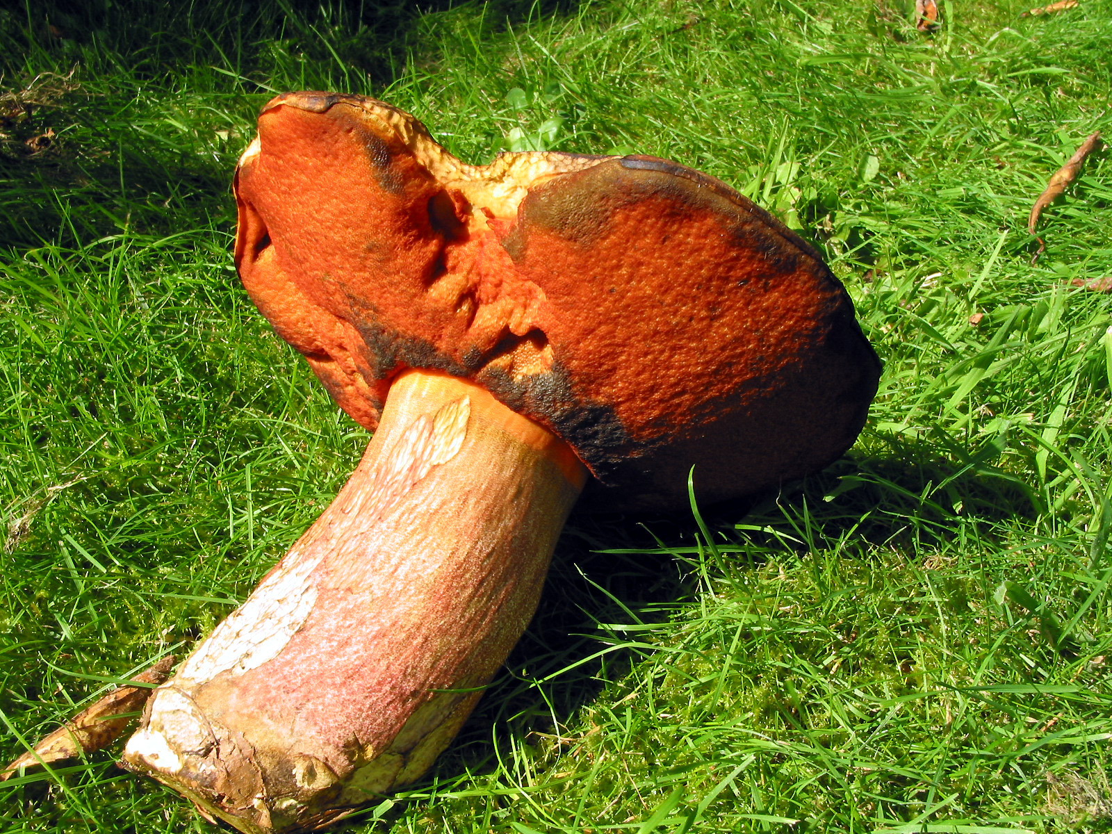 Boletus erythropus